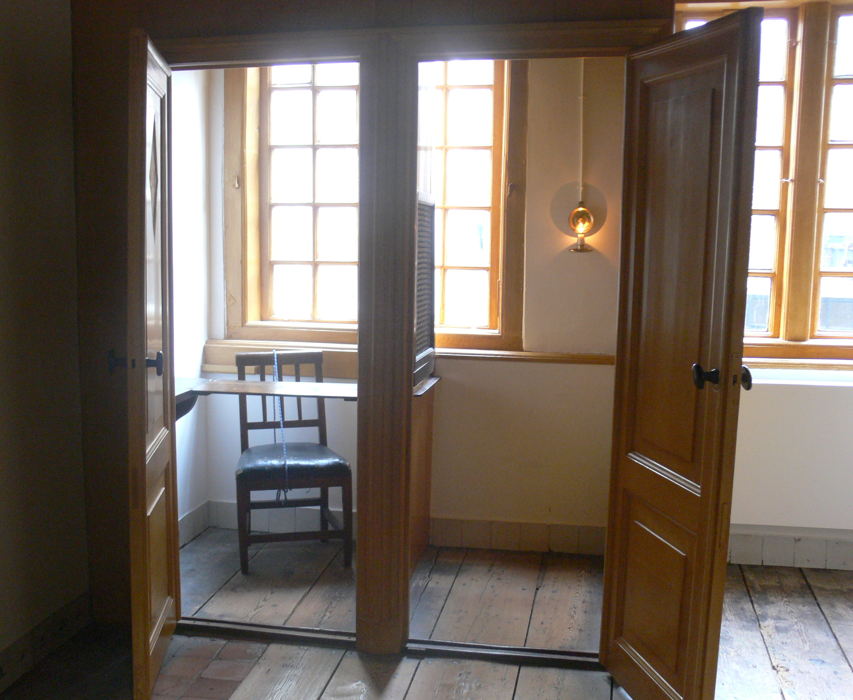 Amsterdam - Museum Ons' Lieve Heer op Solder